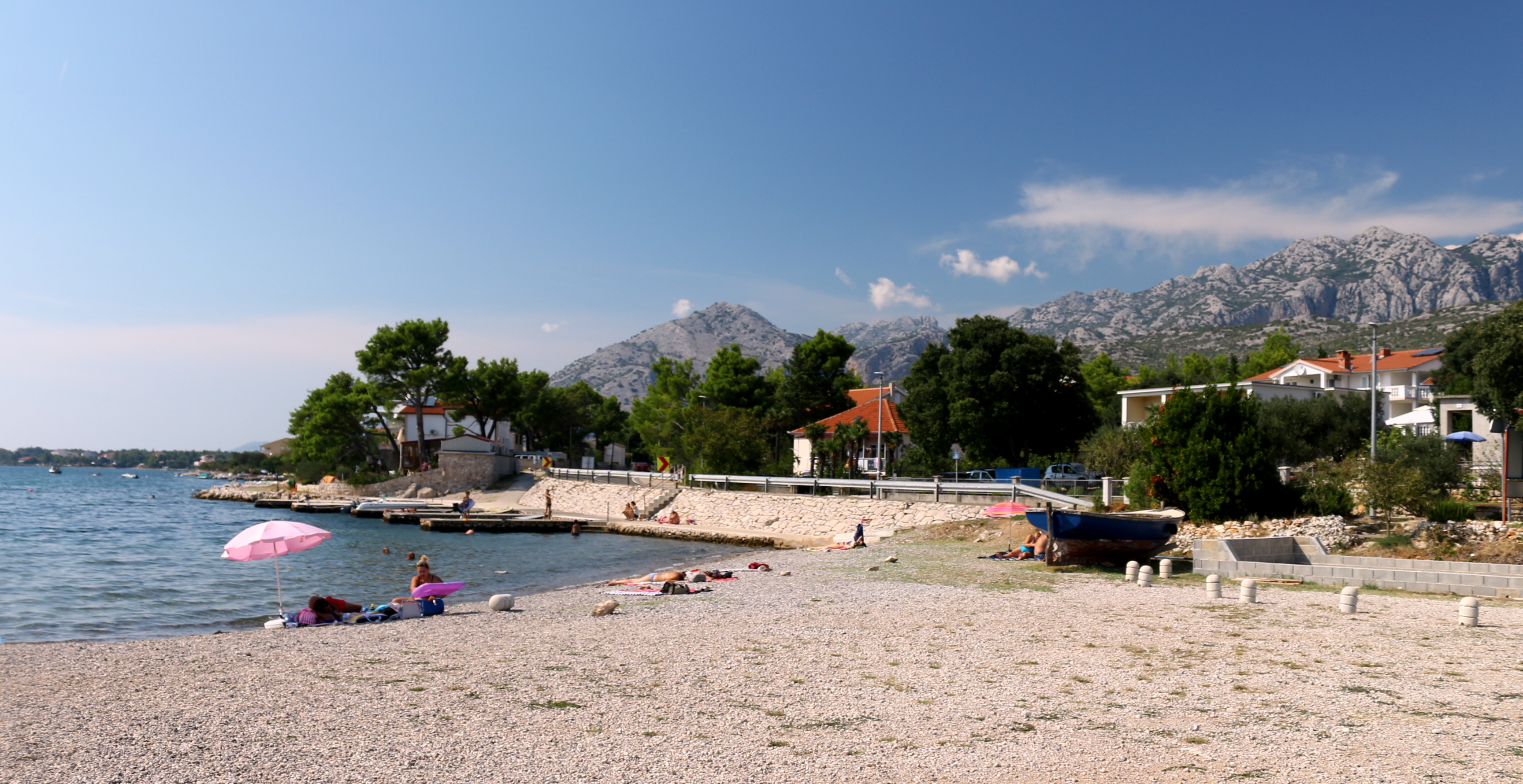 Seline (Starigrad), Zadarská župa, Chorvatsko